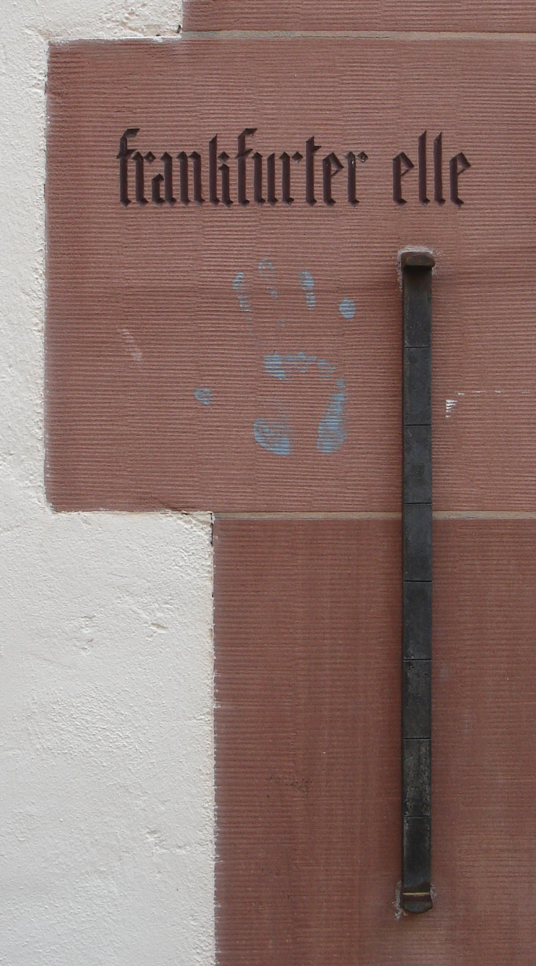 Frankfurter Elle